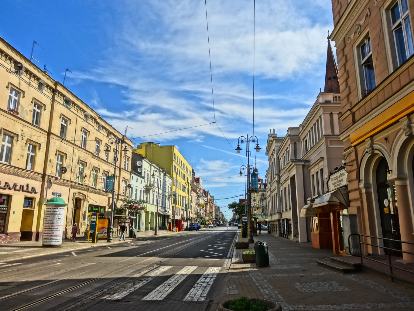 Ulica Gdańska w Bydgoszczy na odcinku między ul. Dworcową, a ul. Śniadeckich